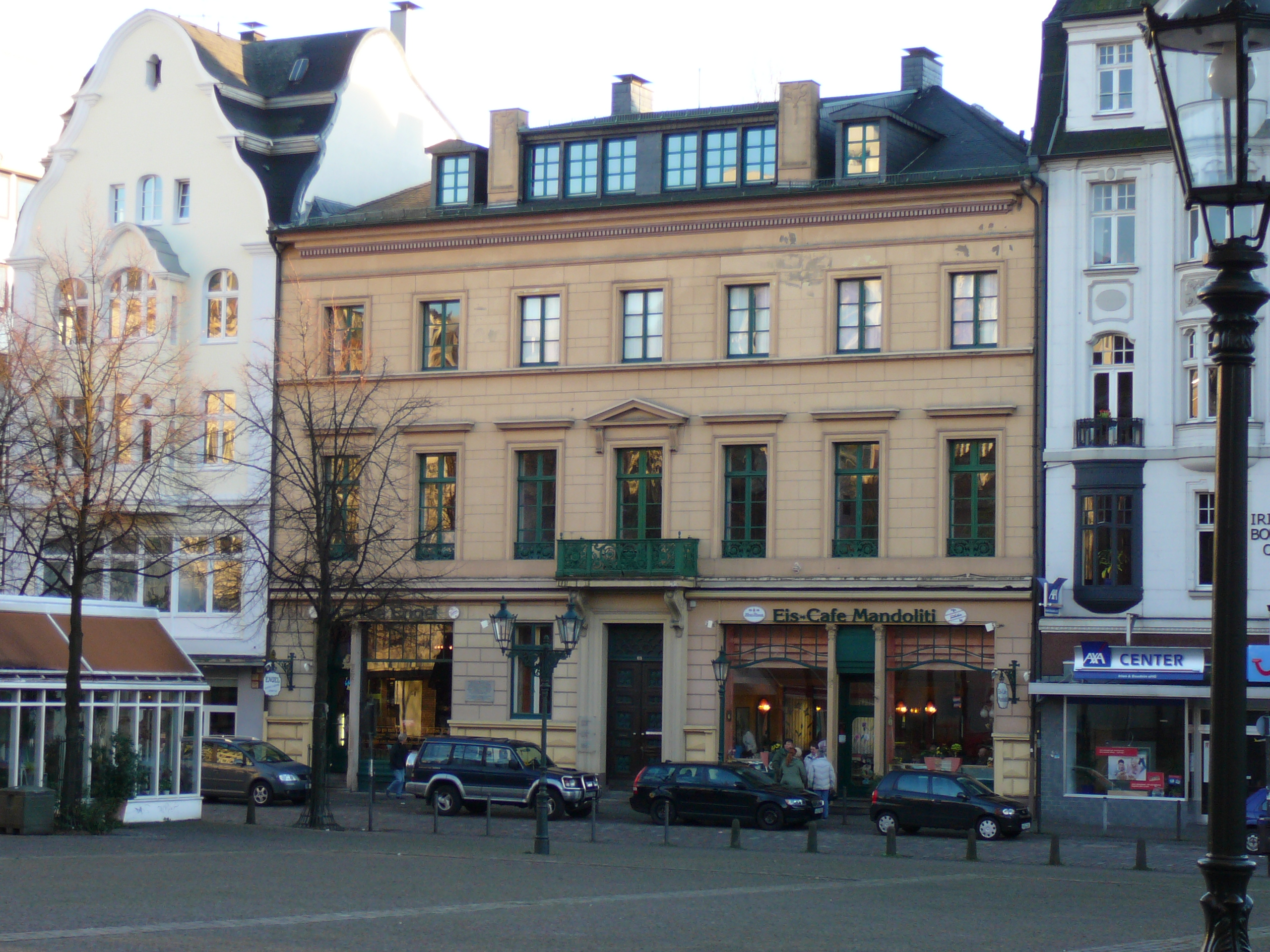 Villa in der Friedrich-Ebert-Str, Wuppertal